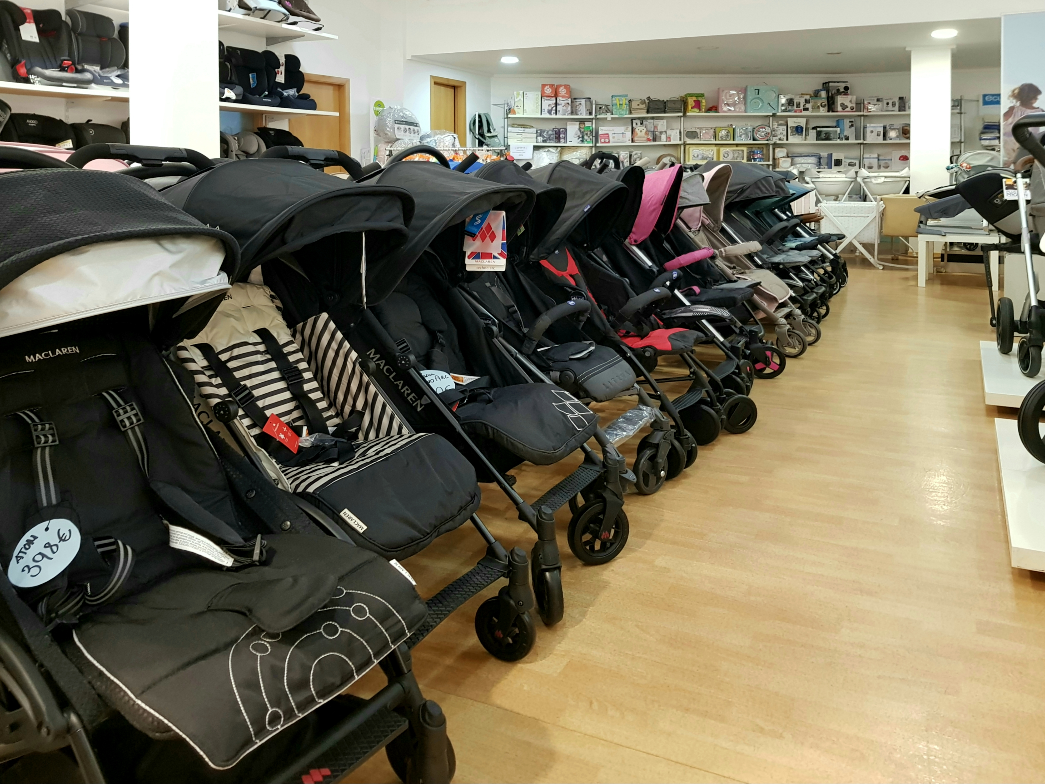 Cotxets d'una tenda de Dénia, Marina Alta.